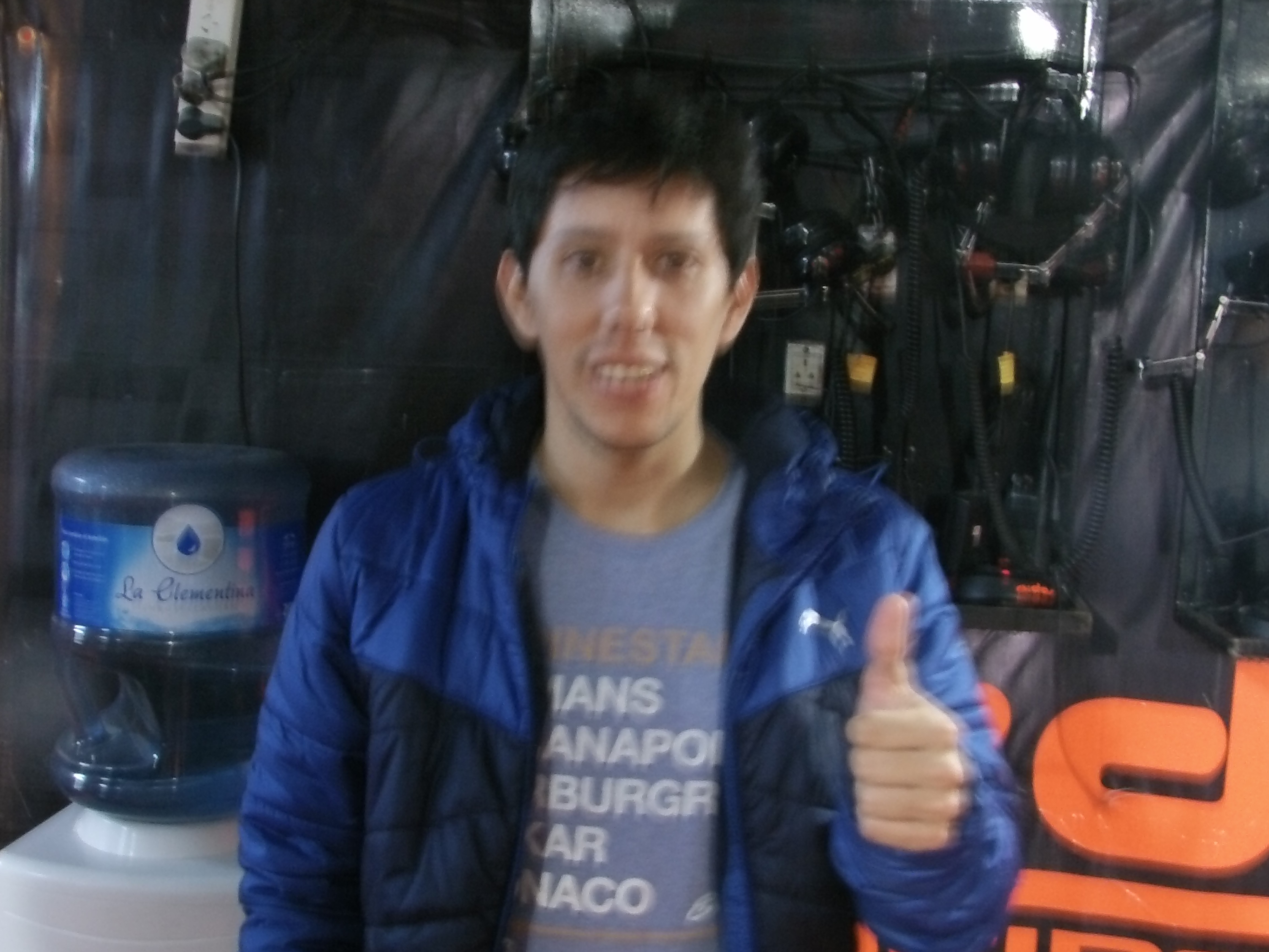 Matías Sebastián Rodríguez, piloto argentino de automovilismo de velocidad. Participante de categorías como el Turismo Carretera y el Top Race. Campeón 2015 de Top Race V6